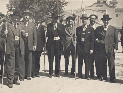 La Corporación municipal alicantina con su alcalde-presidente a la cabeza en la romeria de la Santa Faz.